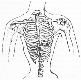 Женская грудная клетка, изменённая после ношения корсета.